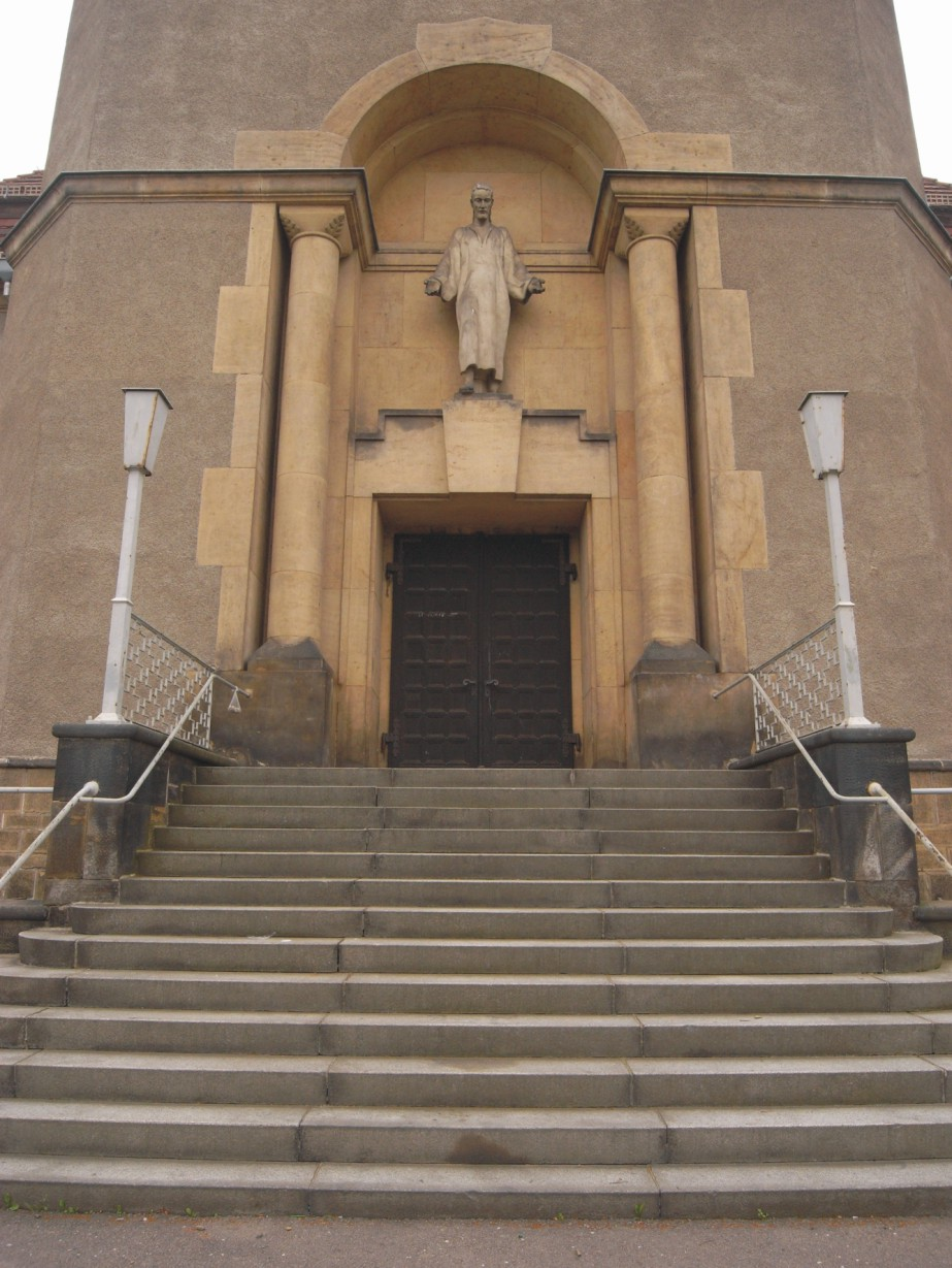 Heilandskirche in Dresden-Cotta (Sachsen, Deutschland)